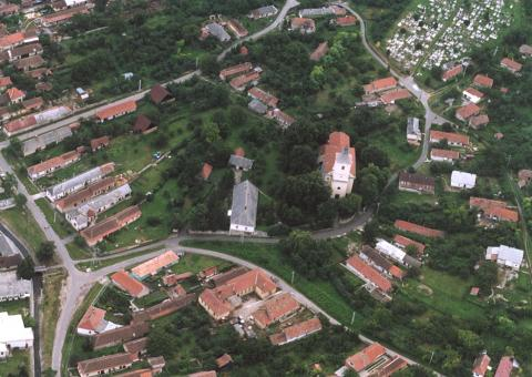 Gönc, Hungary, aerialphotogrpahy